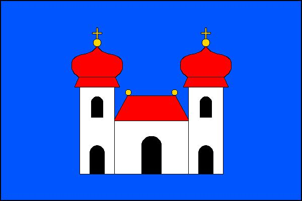 Vlajka obce Machov